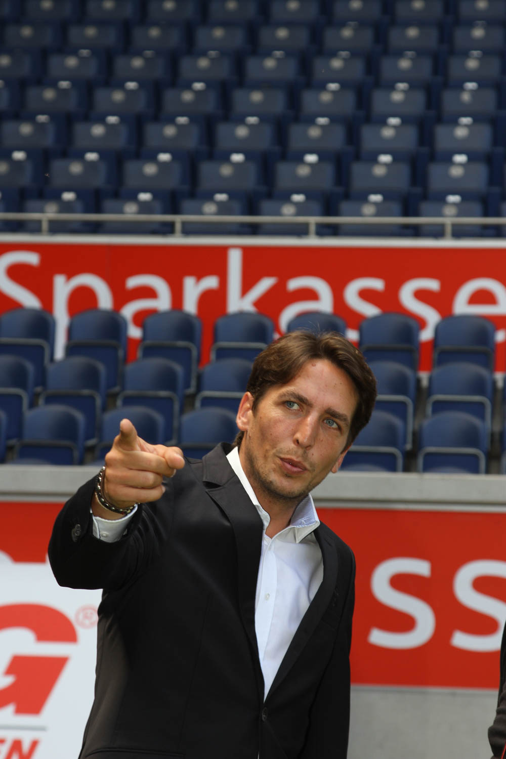 Ivica Grlić 2015